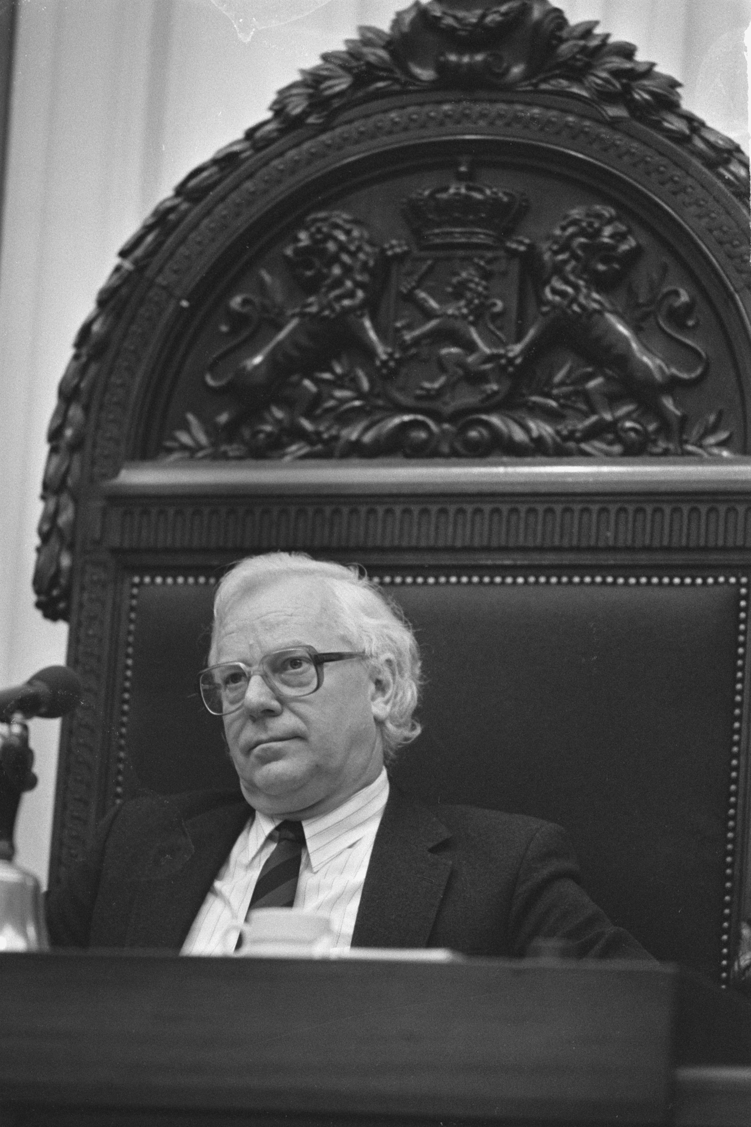 Collectie / Archief : Fotocollectie Anefo Reportage / Serie : [ onbekend ] Beschrijving : Tweede Kamer , Eversdijk (CDA) als Kamervoorzitter Datum : 20 november 1986 Trefwoorden : Kamervoorzitters Persoonsnaam : Eversdijk Instellingsnaam : CDA, Tweede Kamer Fotograaf : Bogaerts, Rob / Anefo Auteursrechthebbende : Nationaal Archief Materiaalsoort : Negatief (zwart/wit) Nummer archiefinventaris : bekijk toegang 2.24.01.05 Bestanddeelnummer : 933-8203